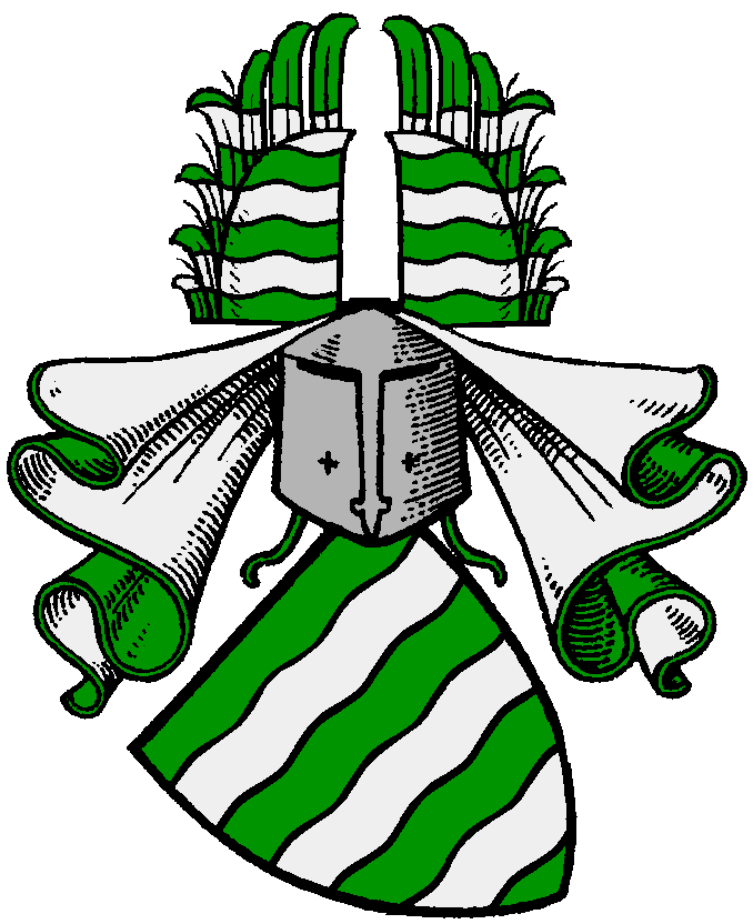 Wappen der von und zu Gilsa (Hessisches Adelsgeschlecht)